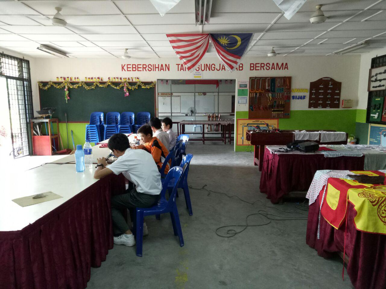 Bengkel tahun semasa